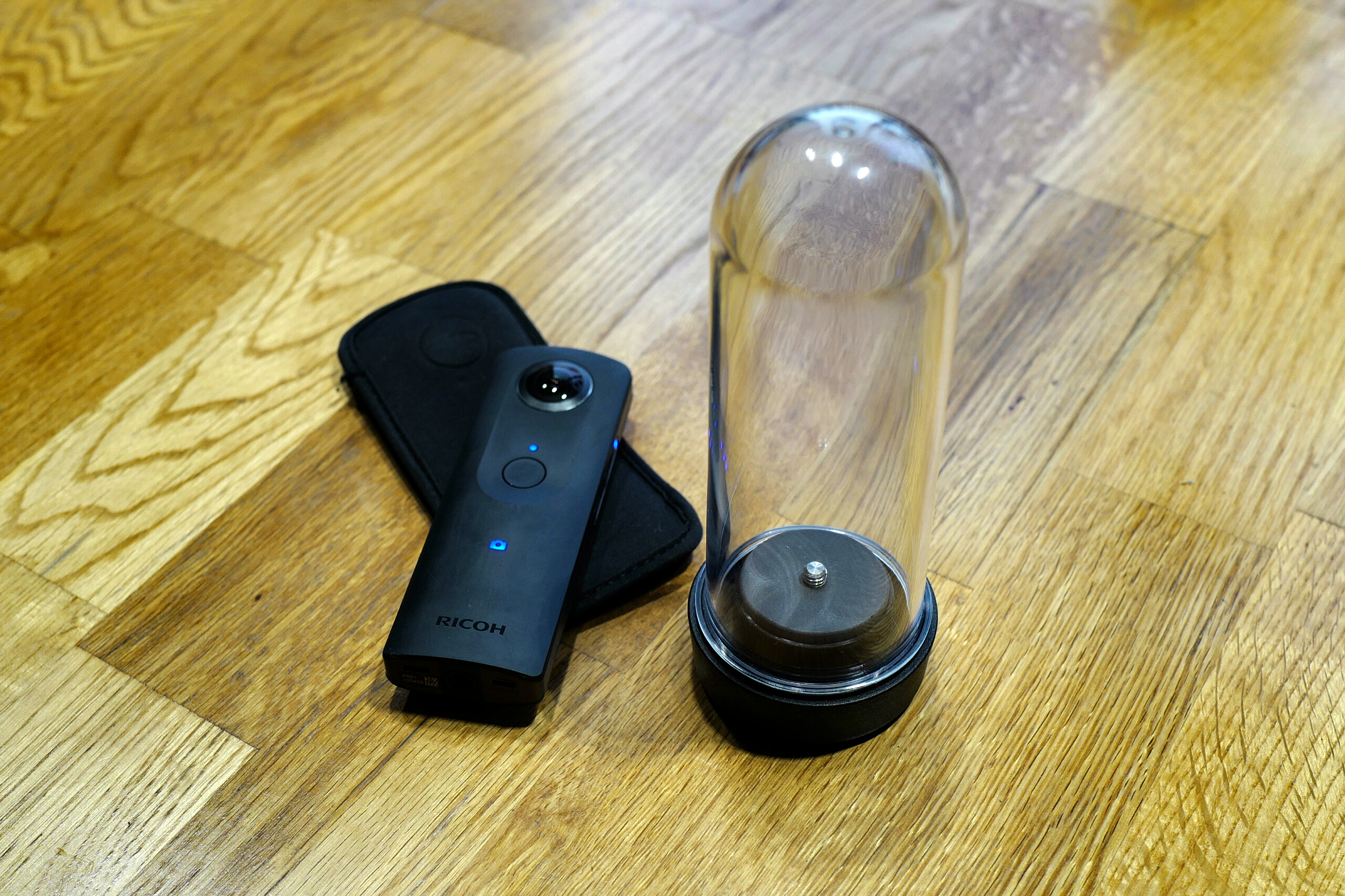 理光 THETA S 相机，与其对应的保护壳『TH-1』。